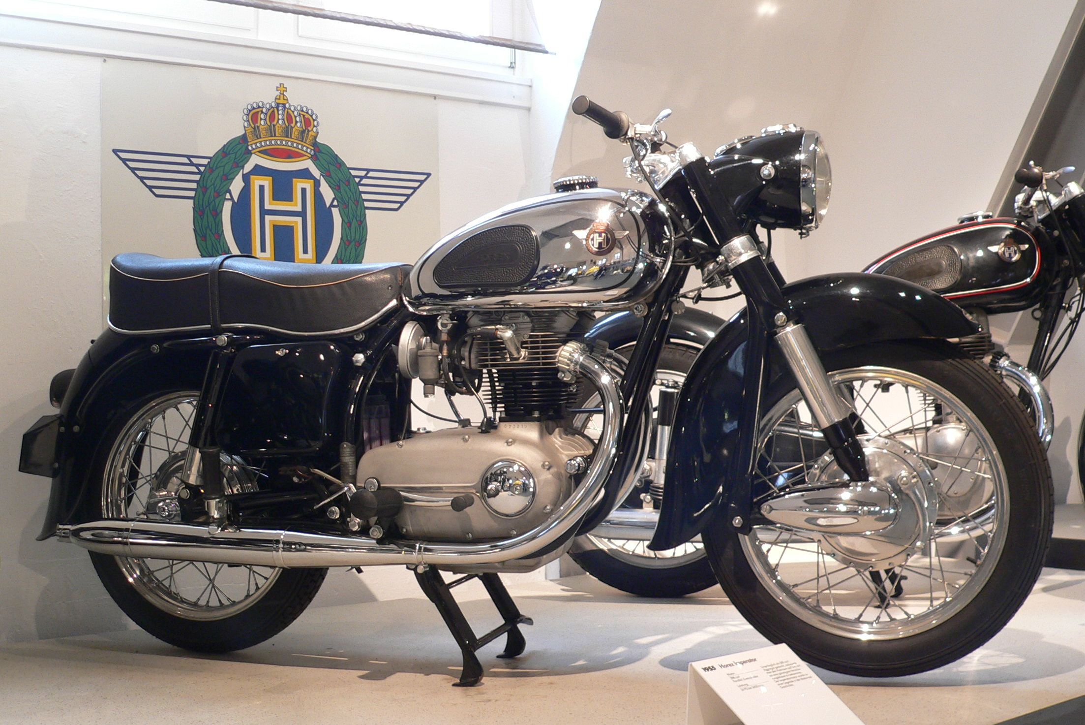 Motorbike "Horex Imperator" (1955) at the Deutsches Zweirad- und NSU-Museum (398 cm³, 24 PS bei 5.650 U/min., 135 km/h)